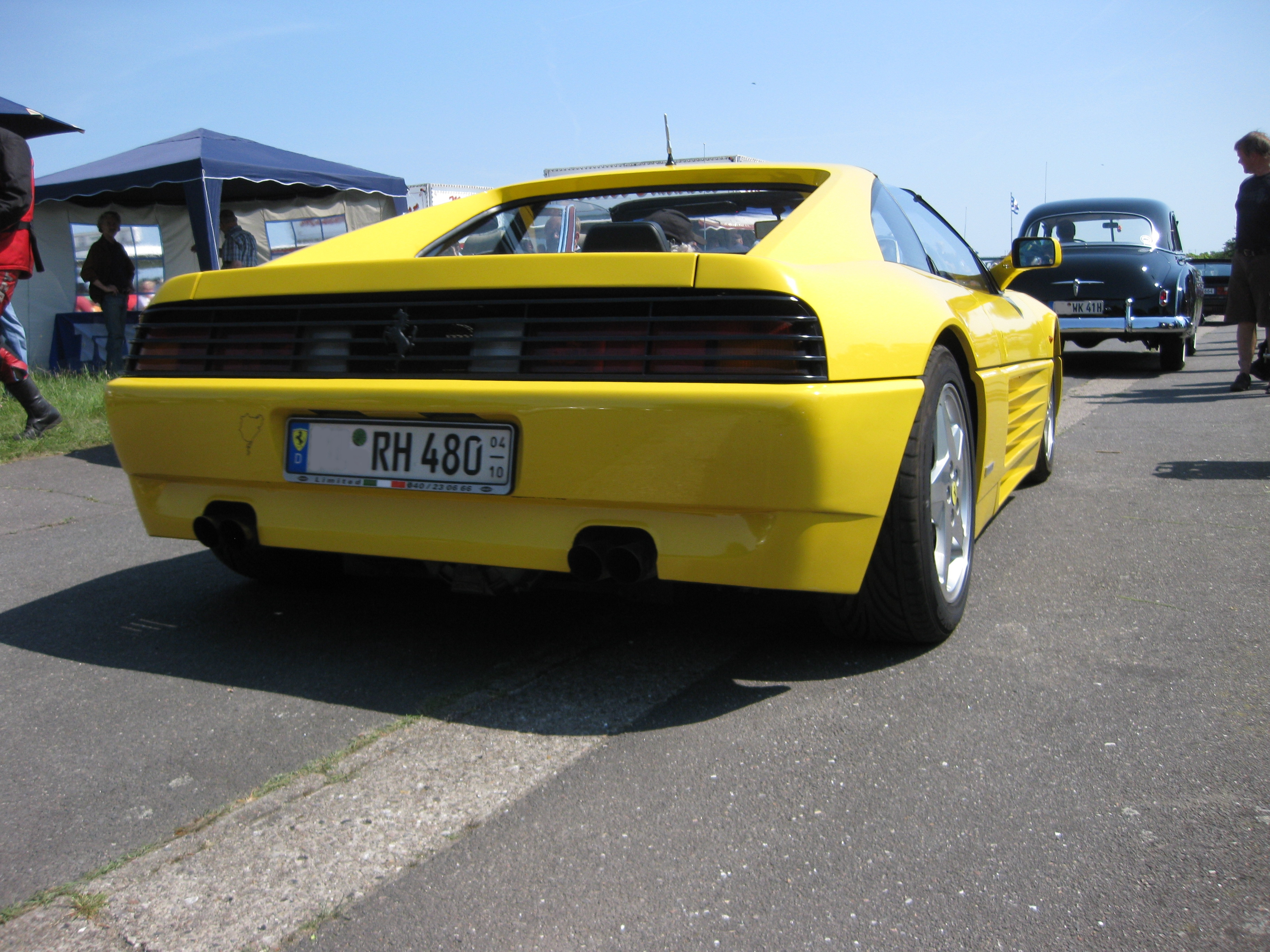 Ferrari 348ts in gelb Heckansicht